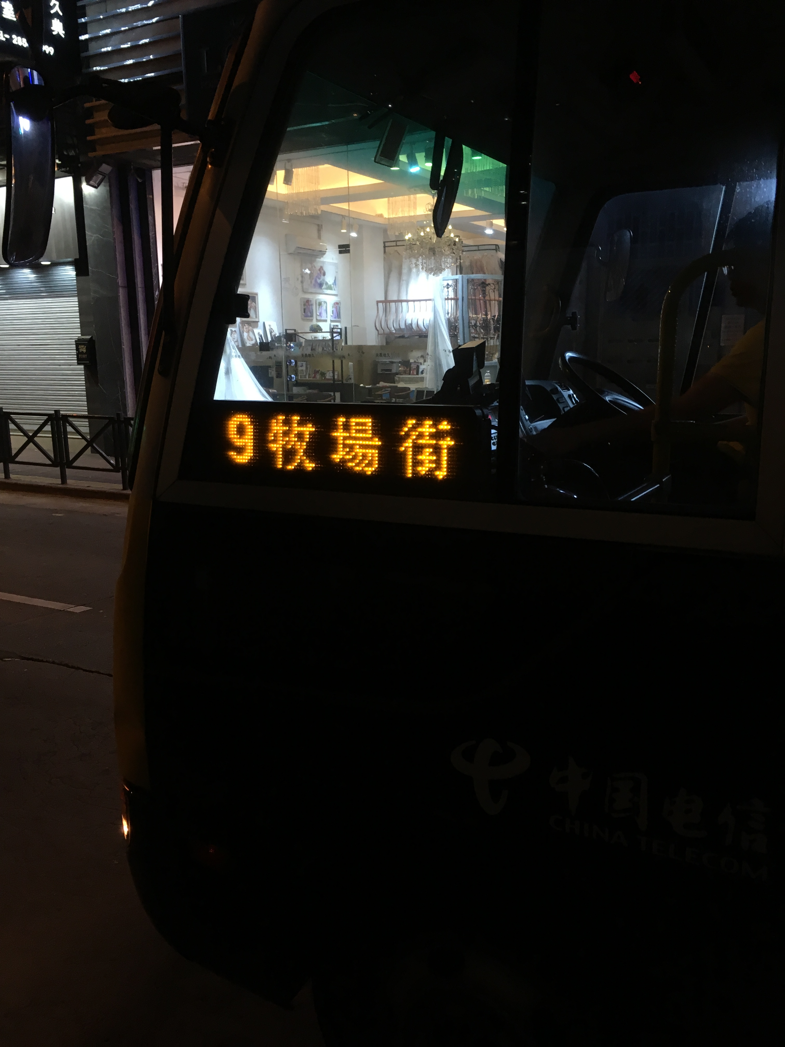 中文（中国大陆）: 澳门新福利9路车,由于關閘总站依然停用,依靠新设立的终点站